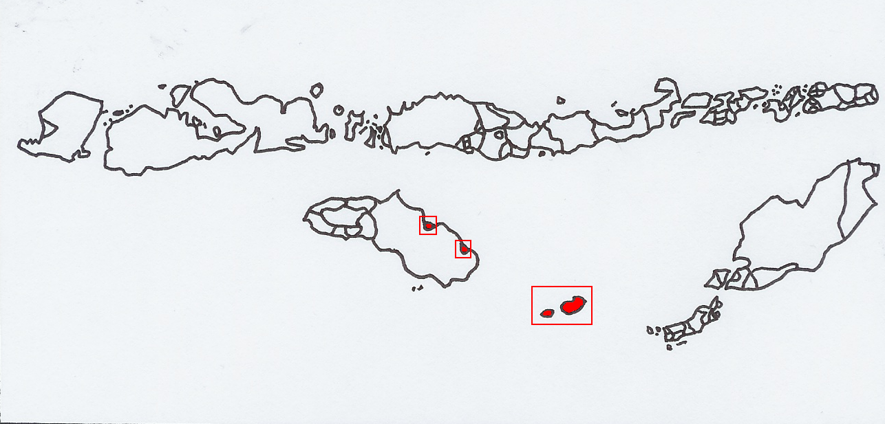 Savoenese taalgebied.